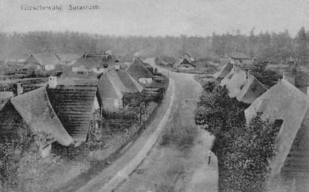 Gieschewald Susannastraße - pocztówka z roku około 1915 przedstawiająca główną ulicę Giszowca, która prowadziła w kierunku nieistniejącej już kolonii Zuzanny i dalej do Katowic.